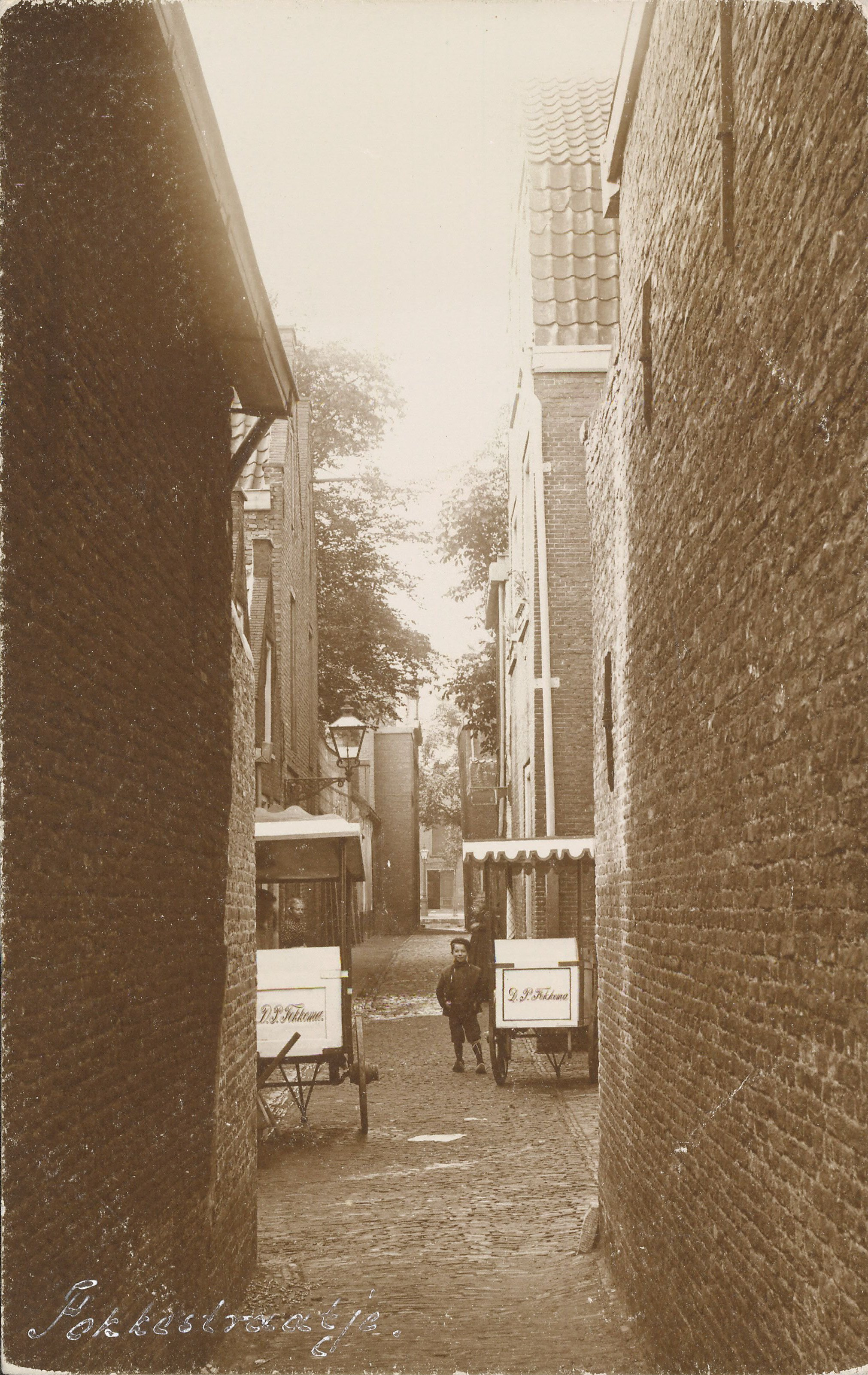 Gezicht in het Fokkestraatje van de Lammermarkt naar de Oude singel. Op de voorgrond 2 karretjes van de firma D.P. Fokkema.